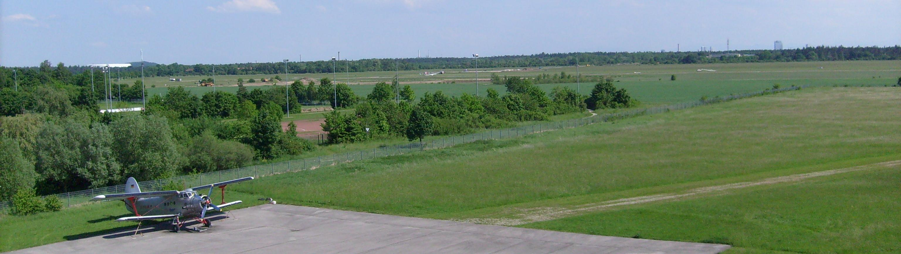 06.06.2010. _ Oberschleissheim